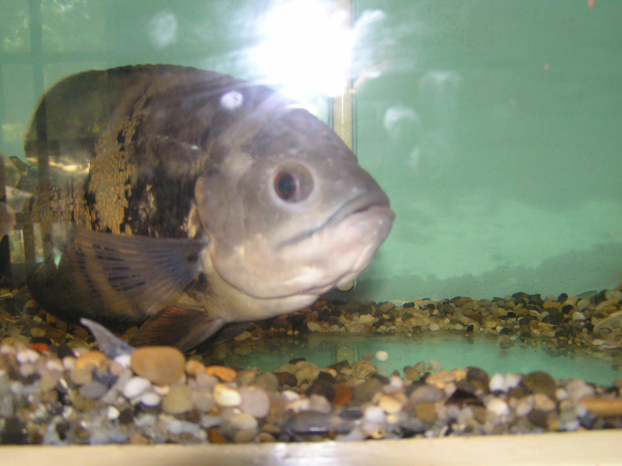 Varna Aquarium, Exposition